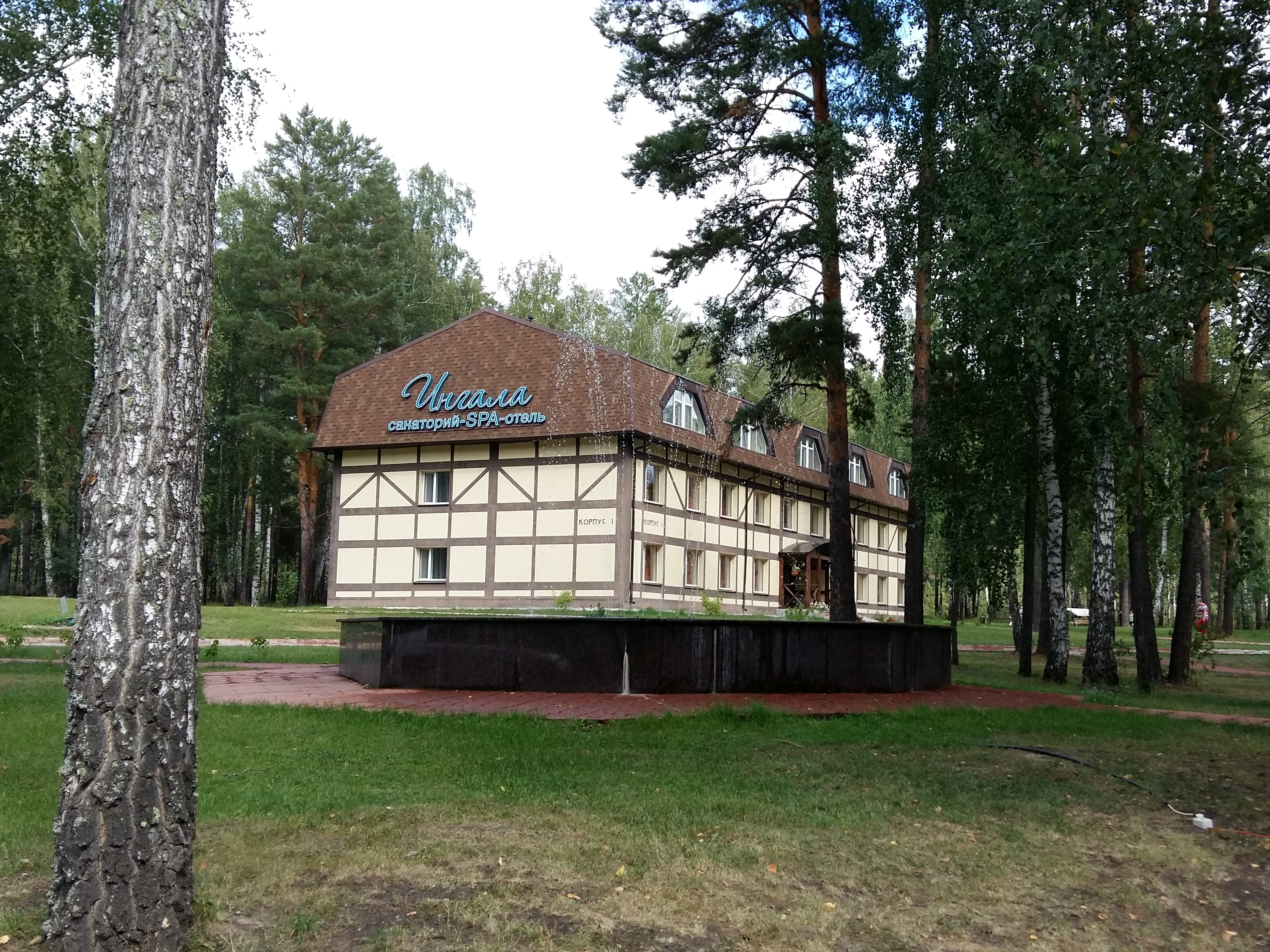 Лечебный корпус санатория "Ингала".